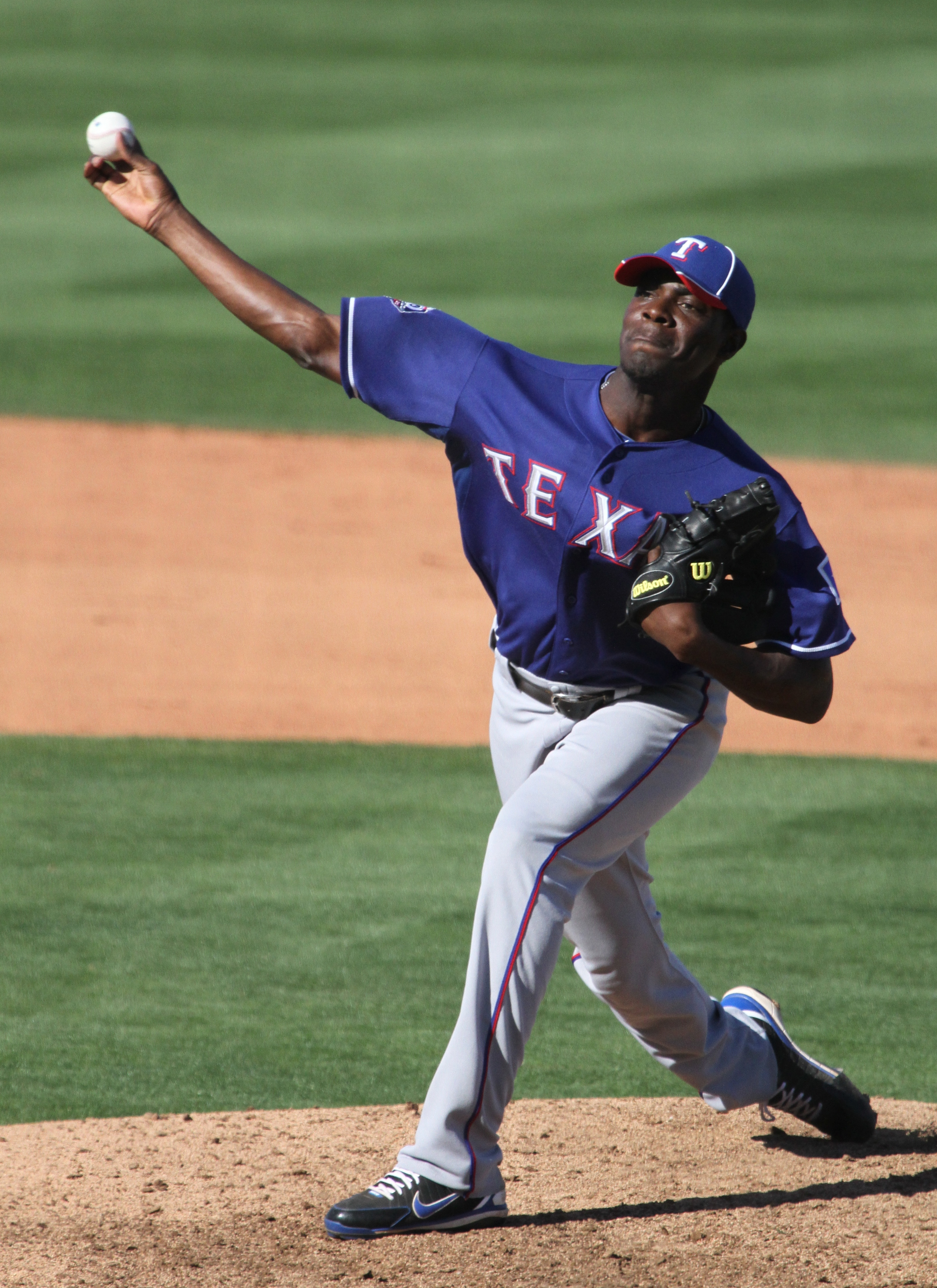 Román Méndez